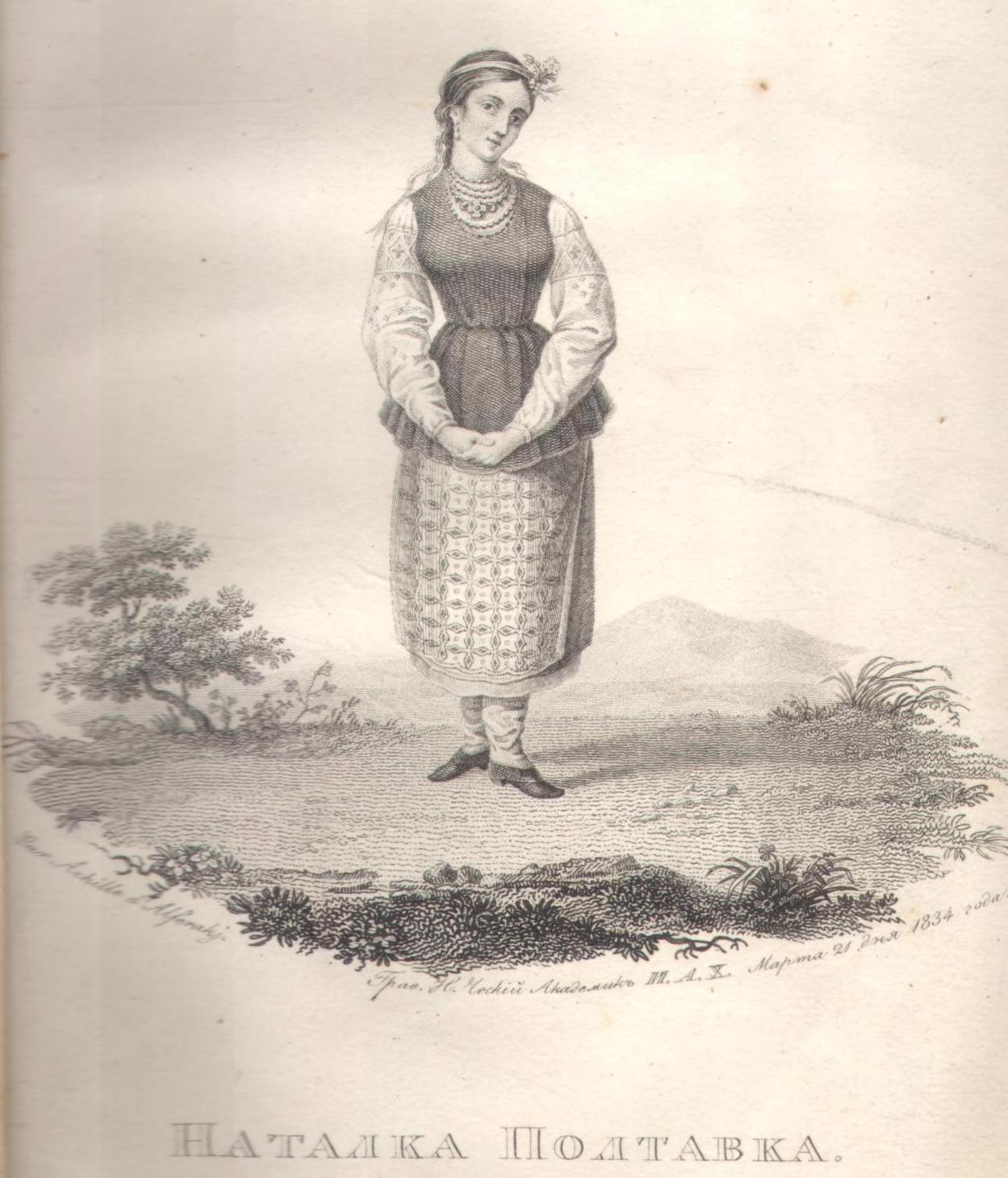 Зображення Наталки Полтавки у харківському збірнику «Утренняя звезда» (1834 р.)